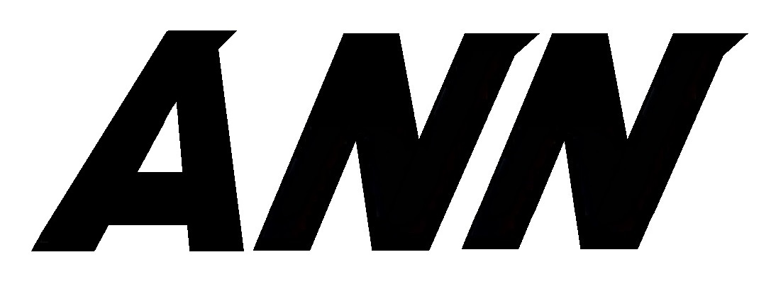 All-nippon News Network初代ロゴ（発足 - 2003年9月）